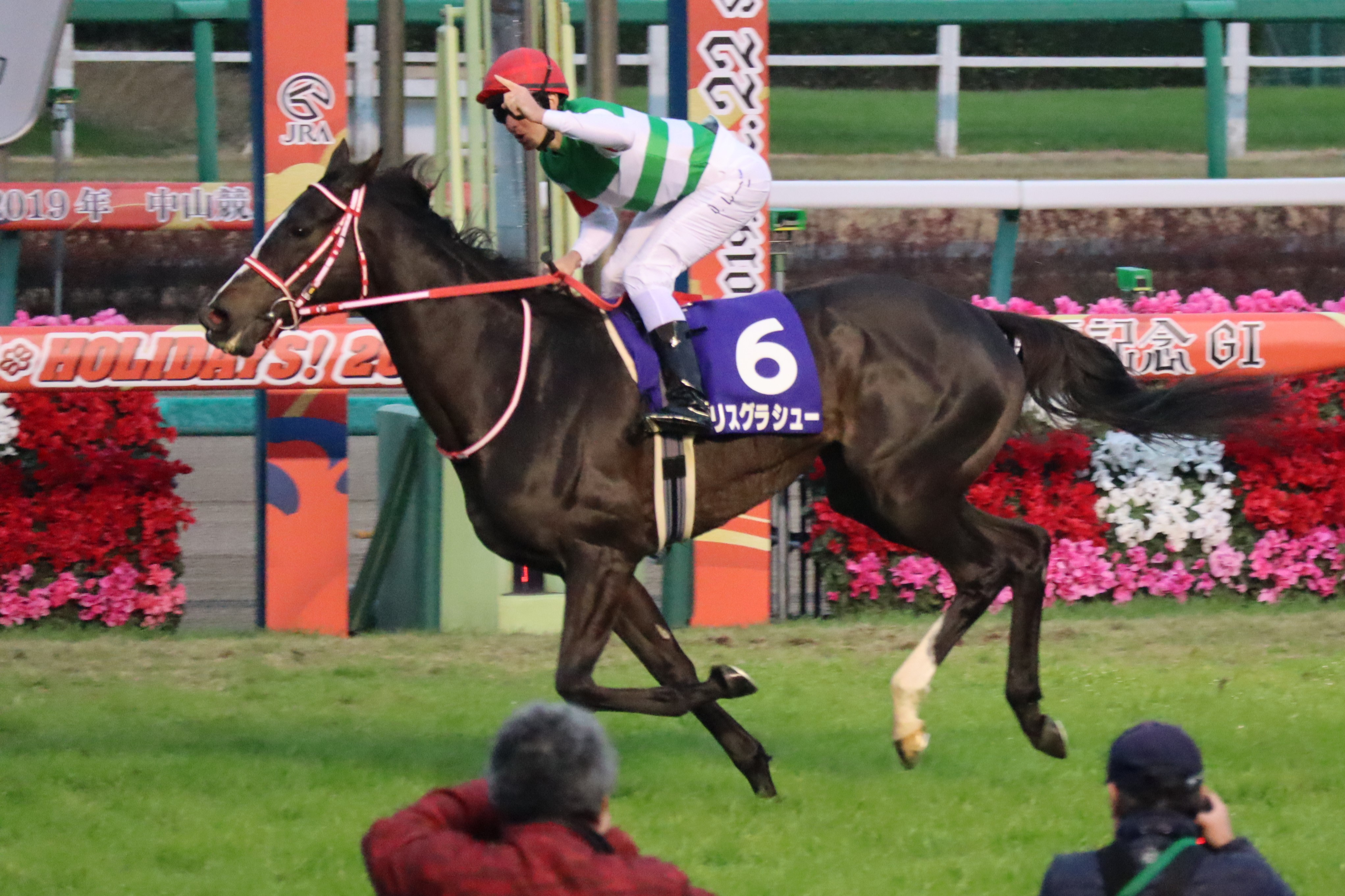 リスグラシュー(2019年有馬記念)